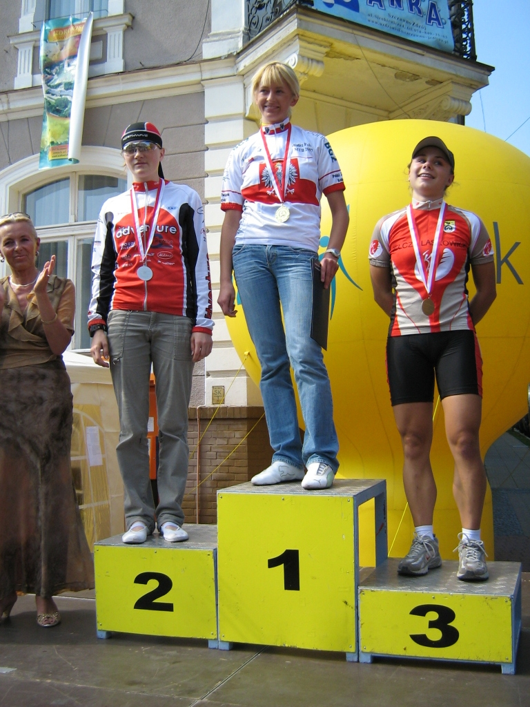 Mistrzostwa Polski MTB 2007 - kat. junior 1. Marta Sułek (RMF FM Mountain Dew Kraków) 2. Debora Jaworska (Adventure Asepta Kenda Łódź), 3. Anna Kowalczyk (UKK Jelcz Laskowice)